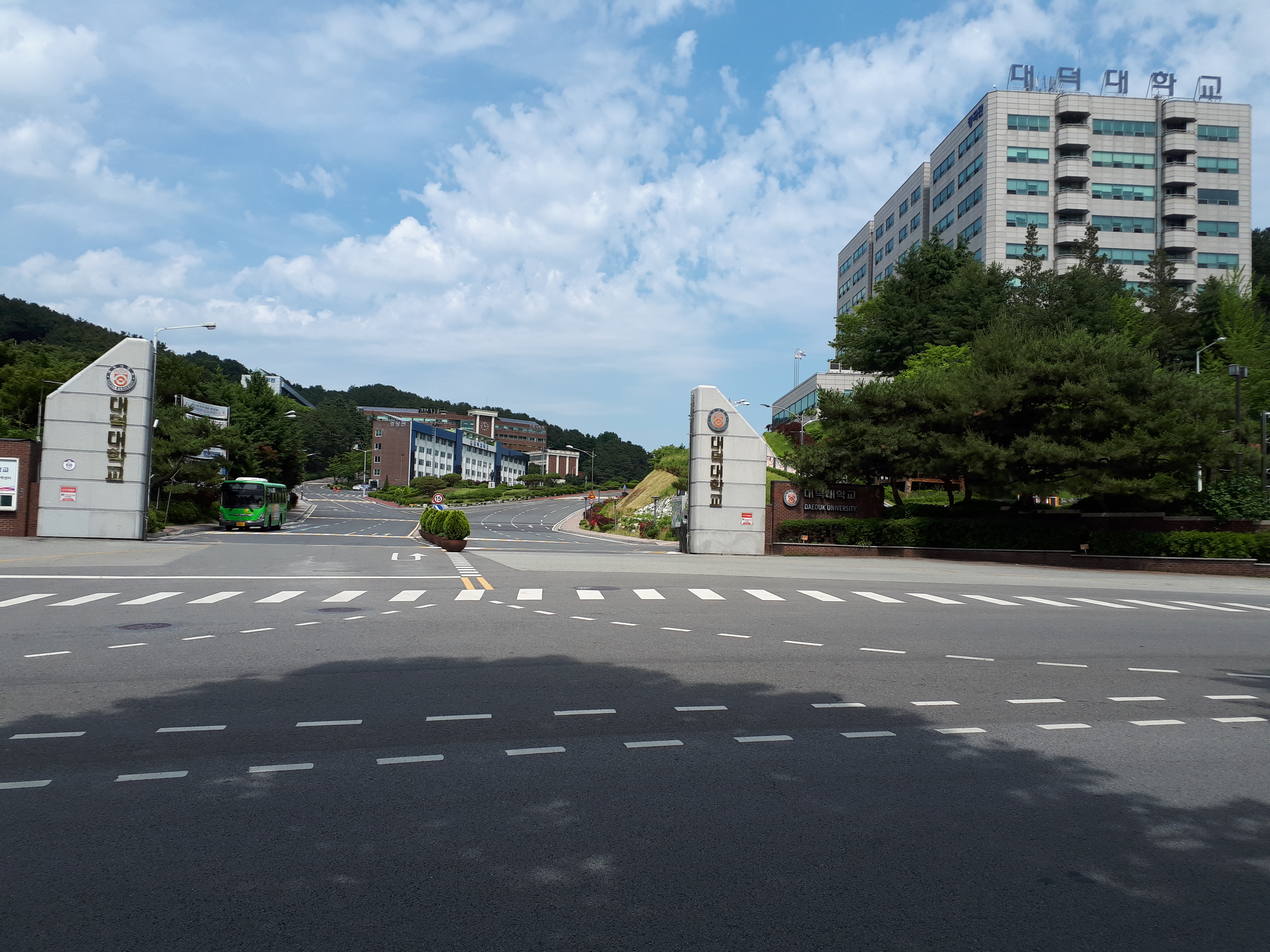 대덕대학교